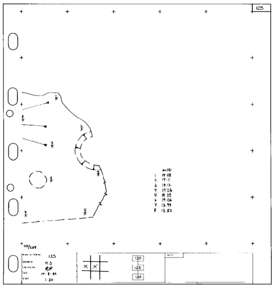 archaeo_plan